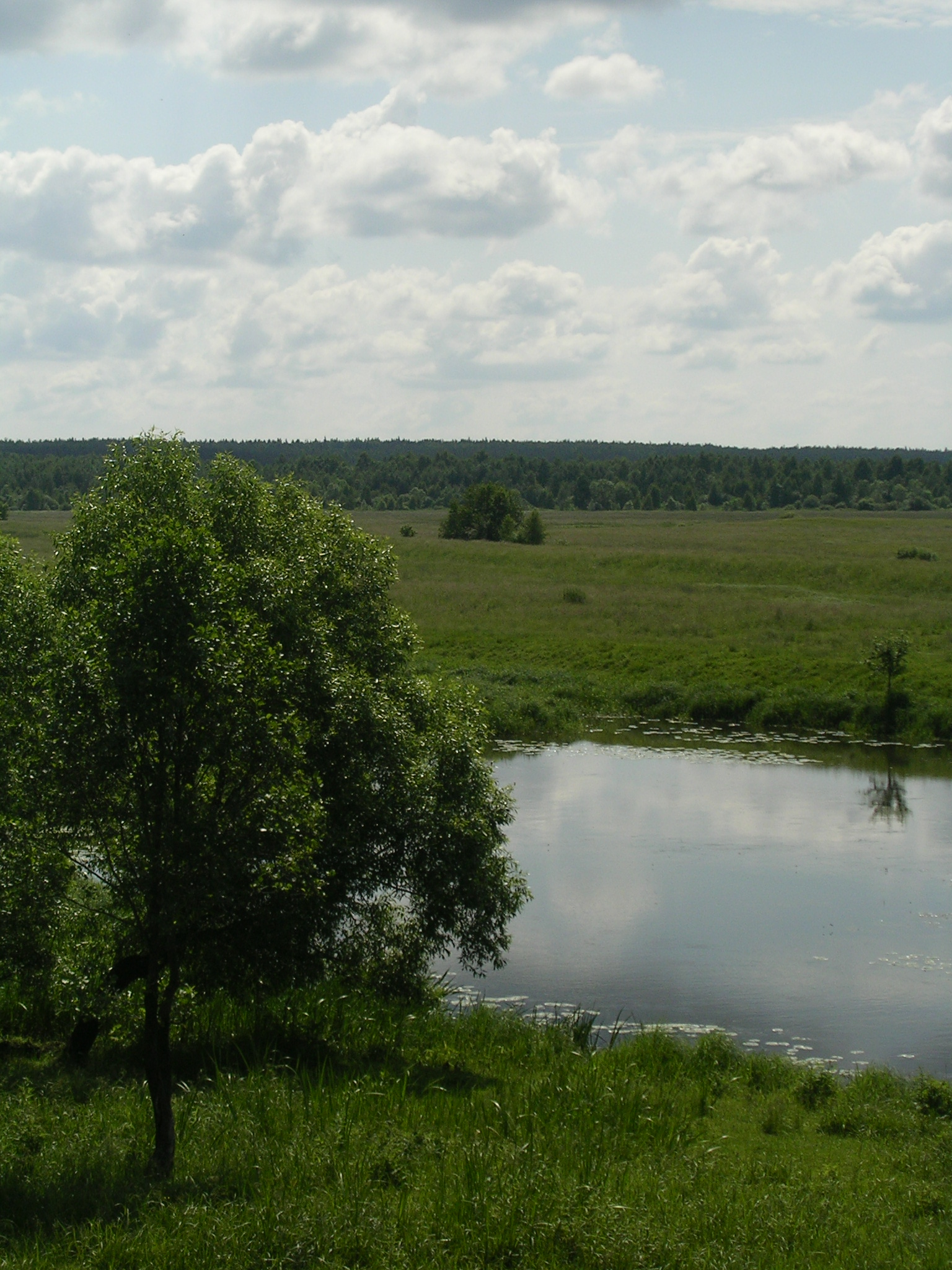 Sherna at Filippovskoe village